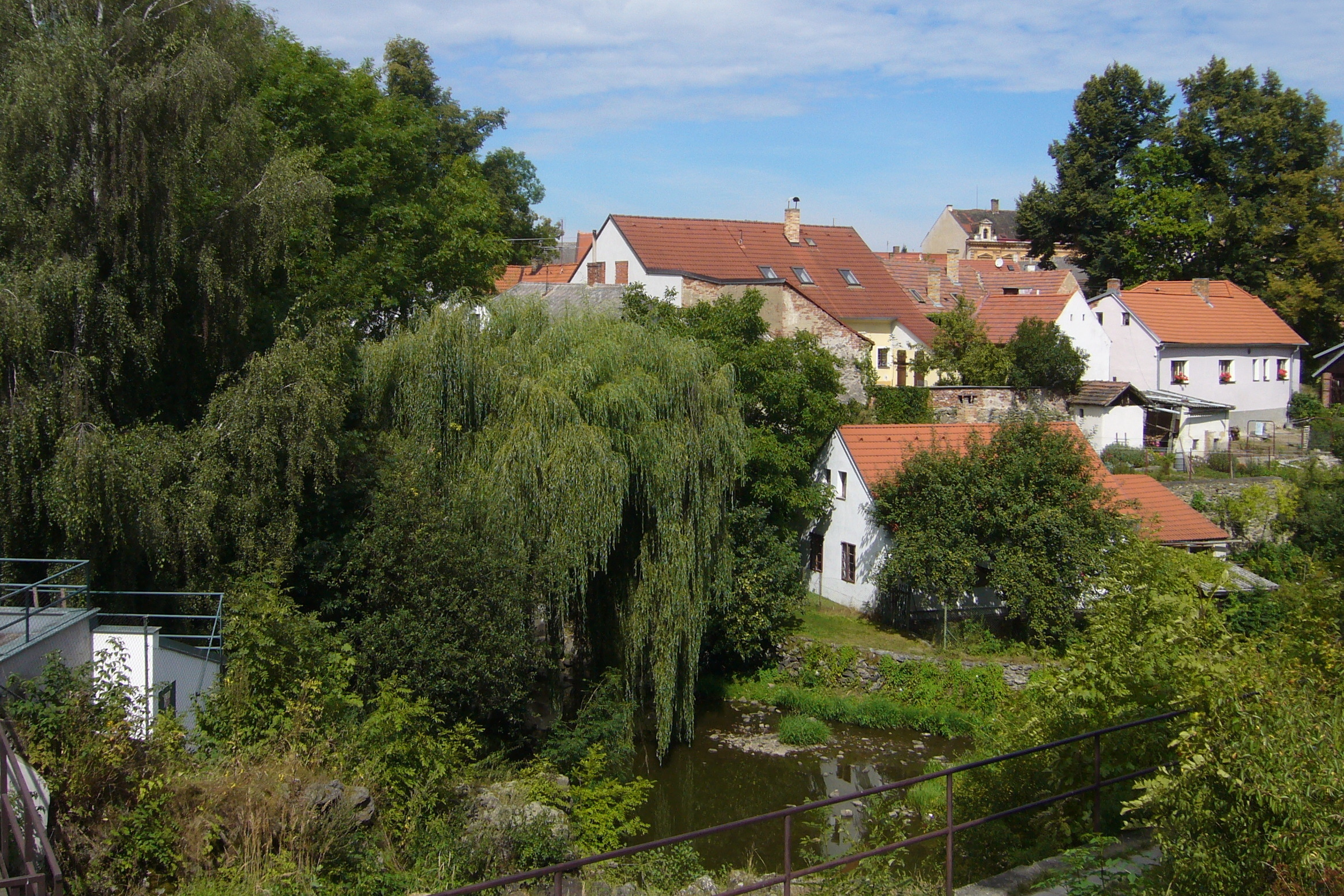 Netolice – místo pod hrází rybníka Mnich, kde stával středověký hrad